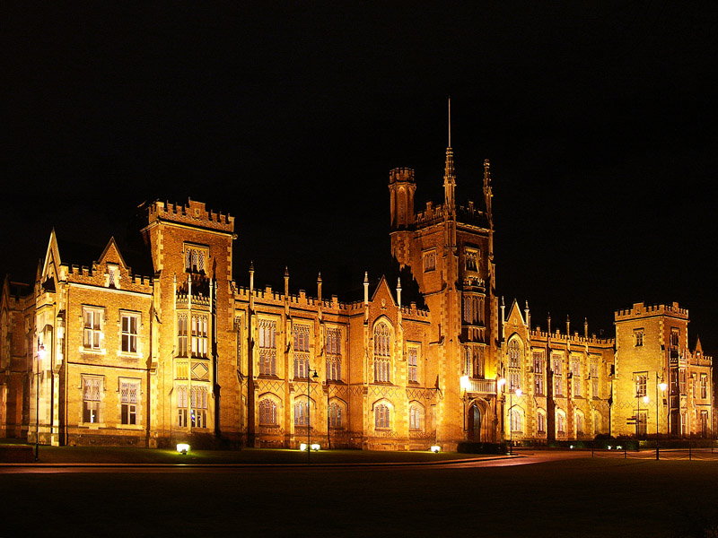 Queens University Belfast